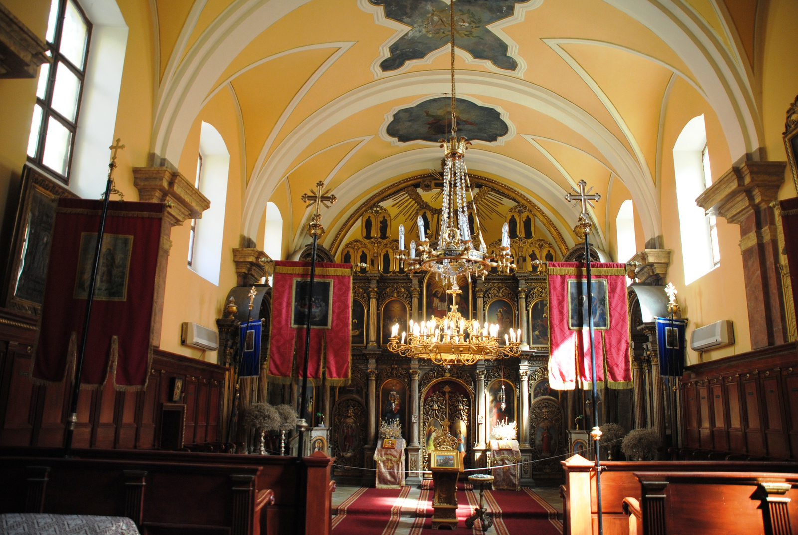 Görögkeleti szerb templom (Budapest 5, Szerb utca 4., Veres Pálné utca 23.) This is a photo of a monument in Hungary, Identifier: 618